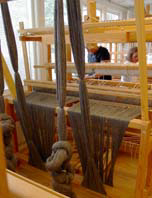 Varp i pådragningsknekt.